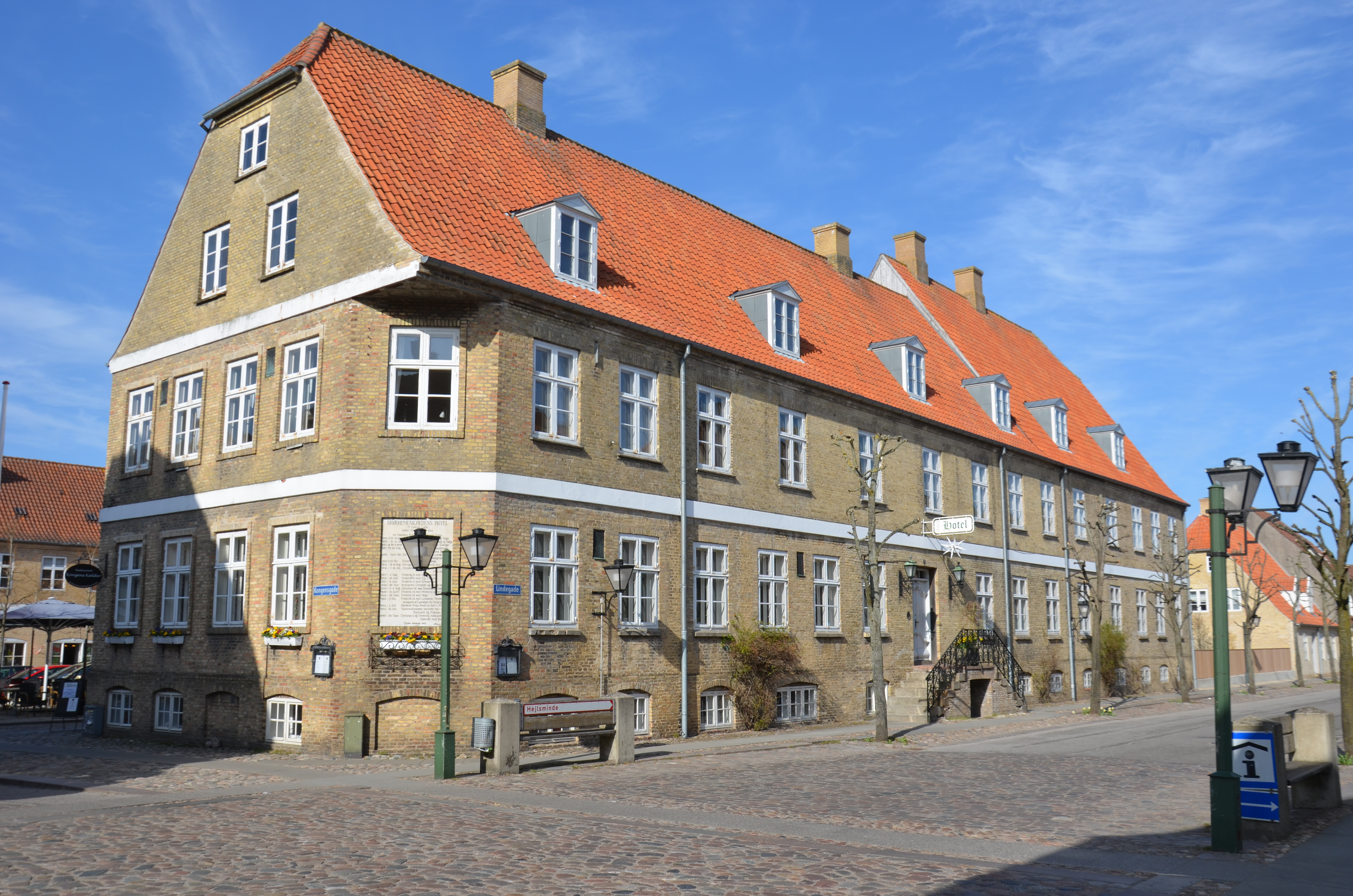 Brödramenighetens Hotel i Christiansfeld, Danmark